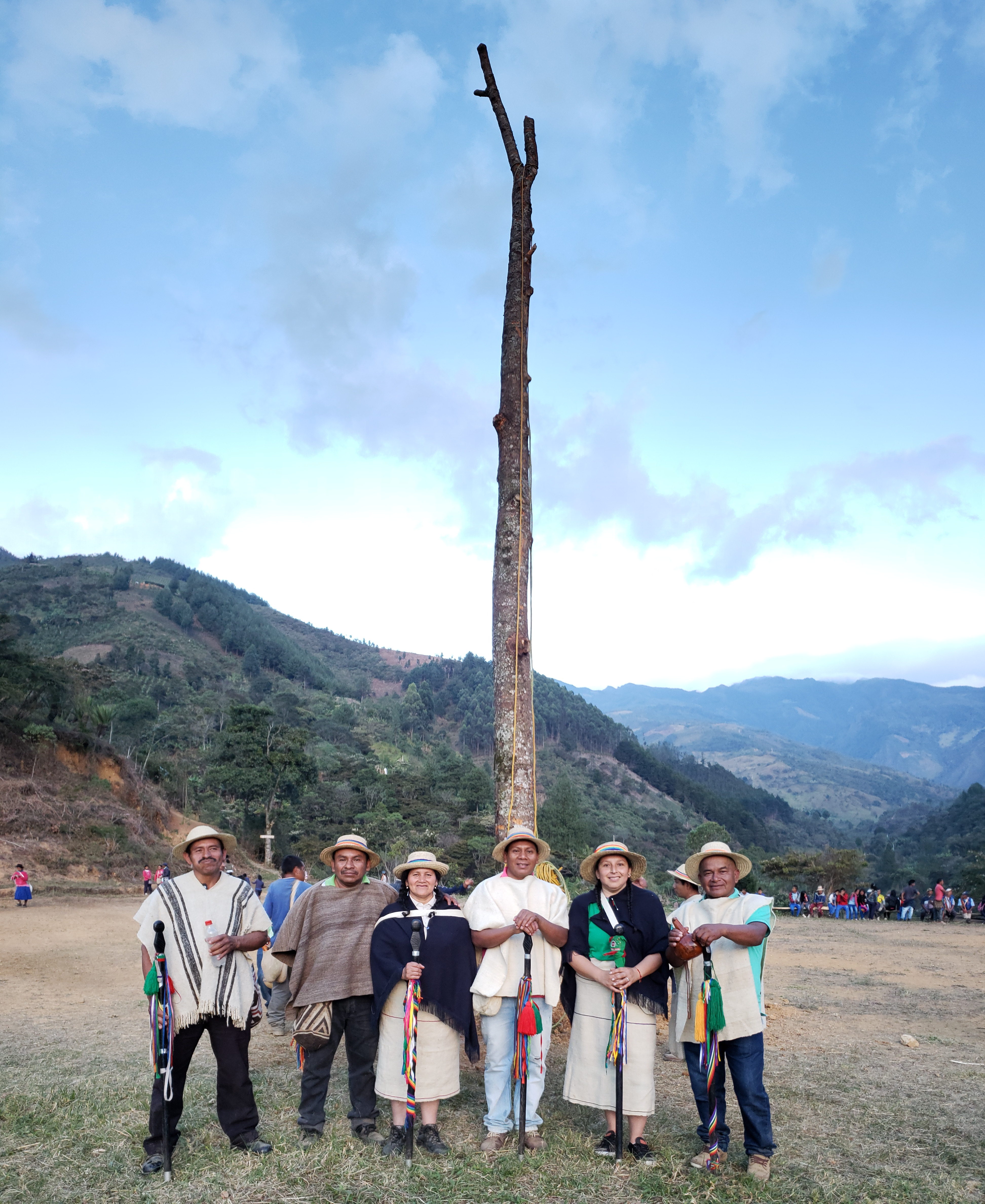 Miembros del gobierno indígena propio conocido como Autoridad tradicional Ne'jwesx del resguardo indígena de Jambaló (Cauca - Colombia) entre los años 2017 y 2019